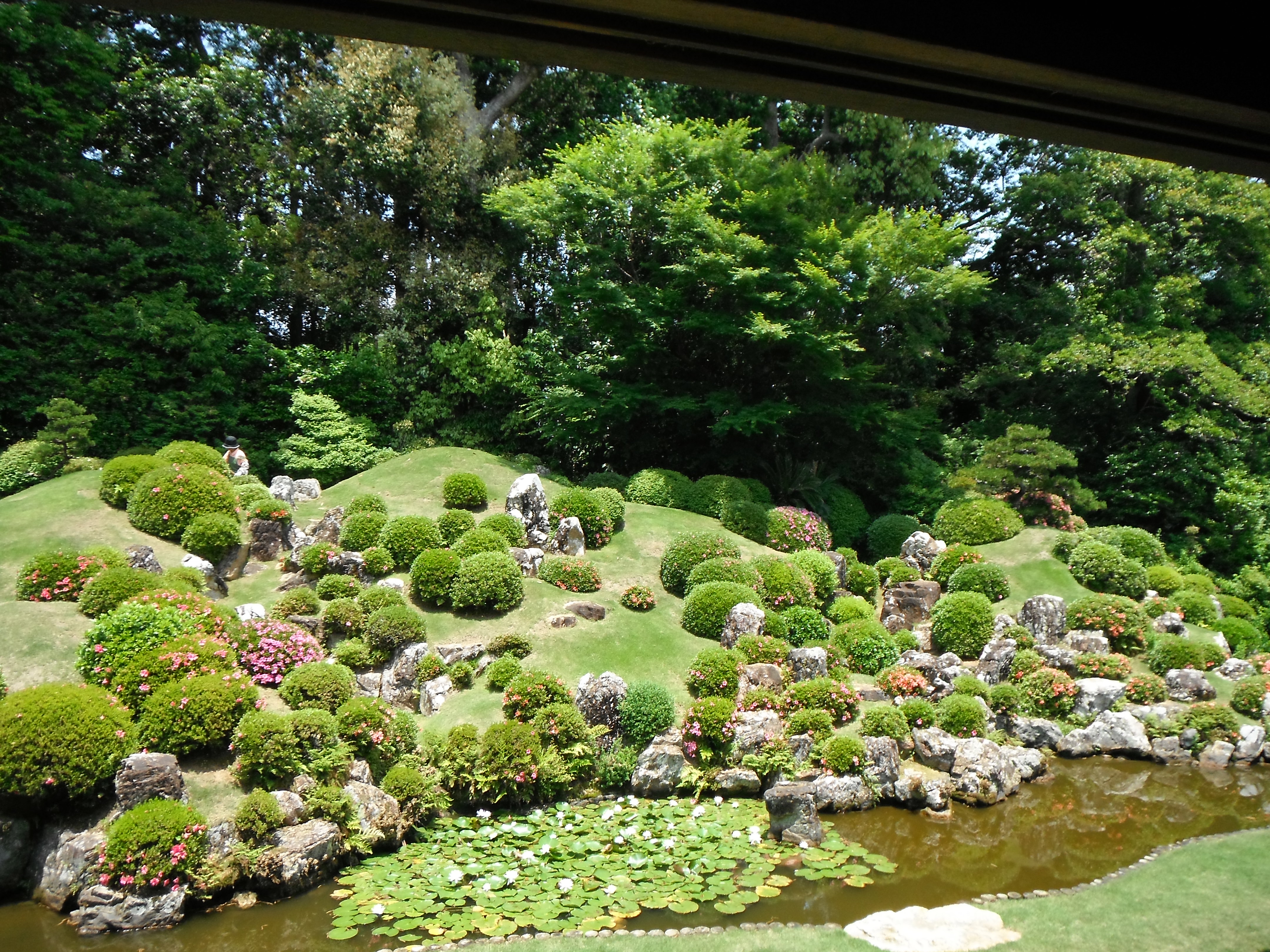 龍潭寺の庭園